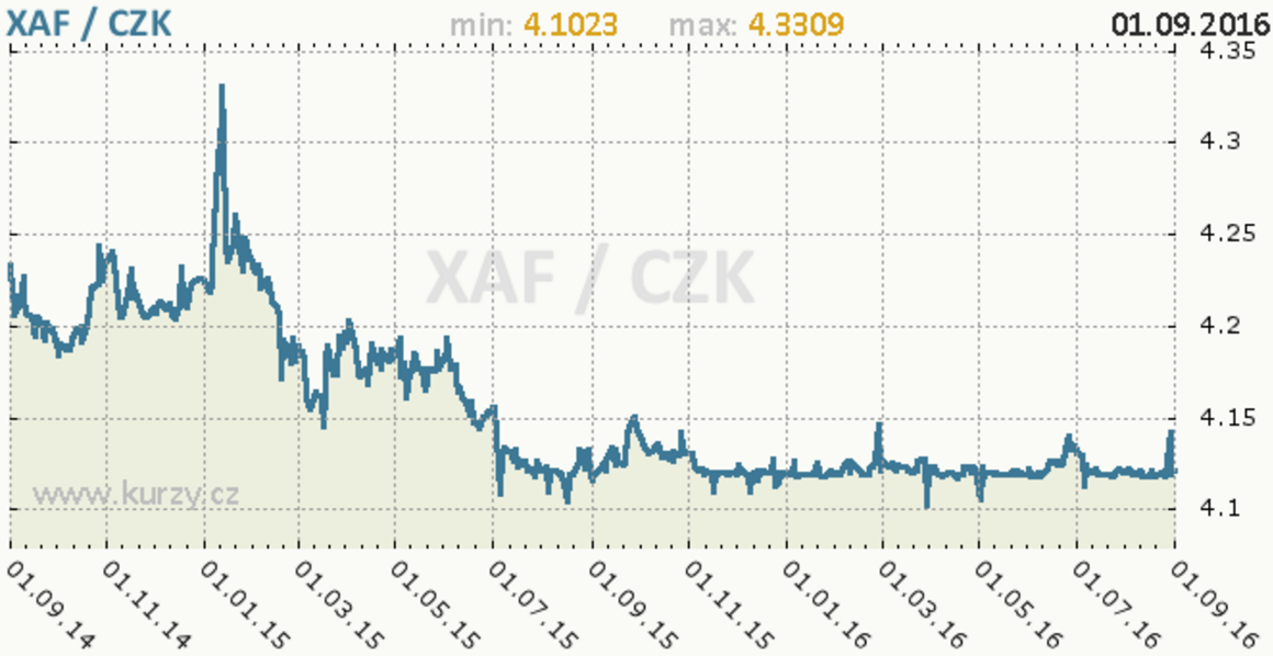 Kurzy měn - středoafrický frank - XAF